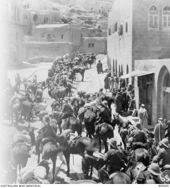 חיילים בריטים בא-סאלט